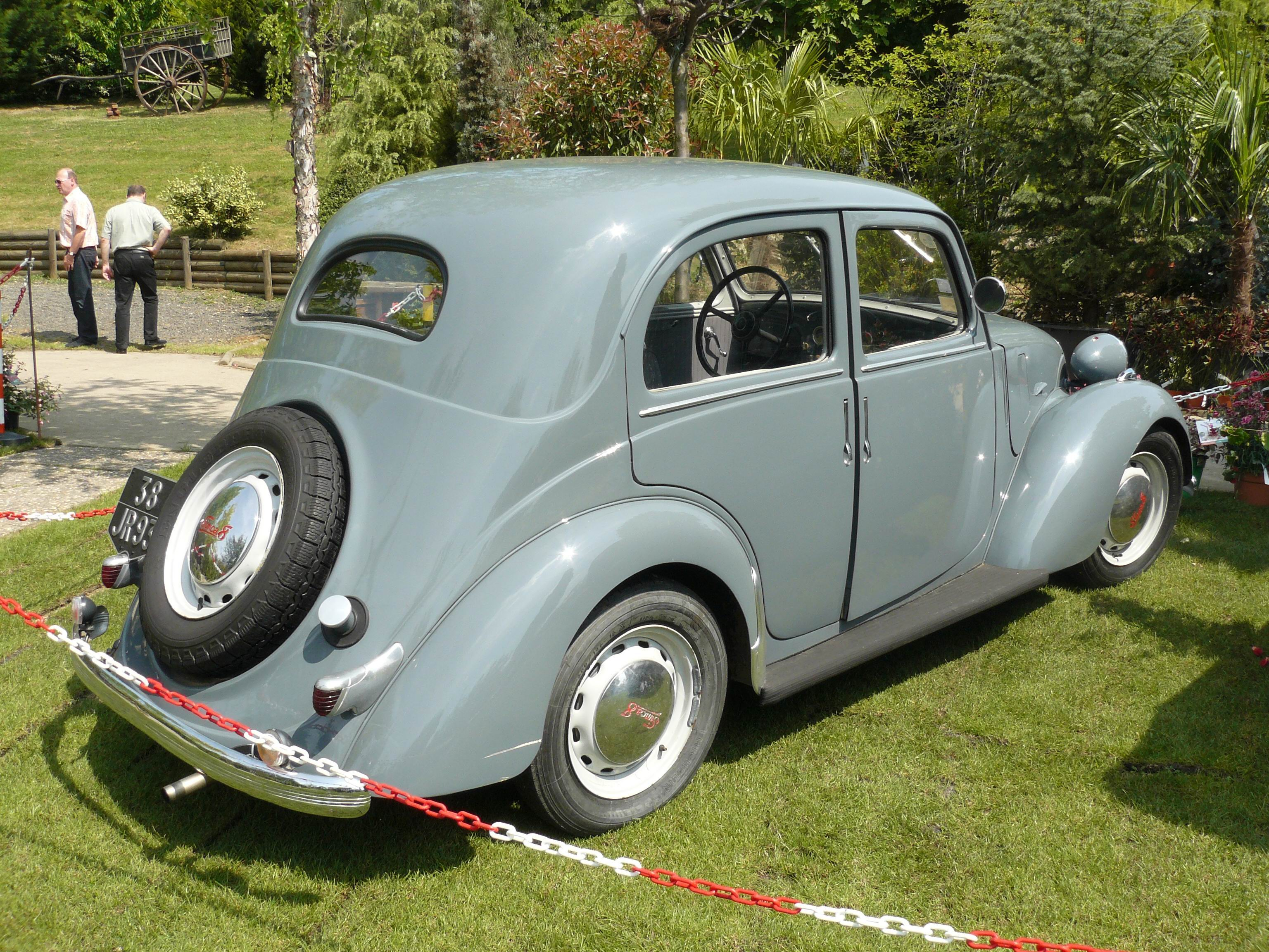 Chelles 2011